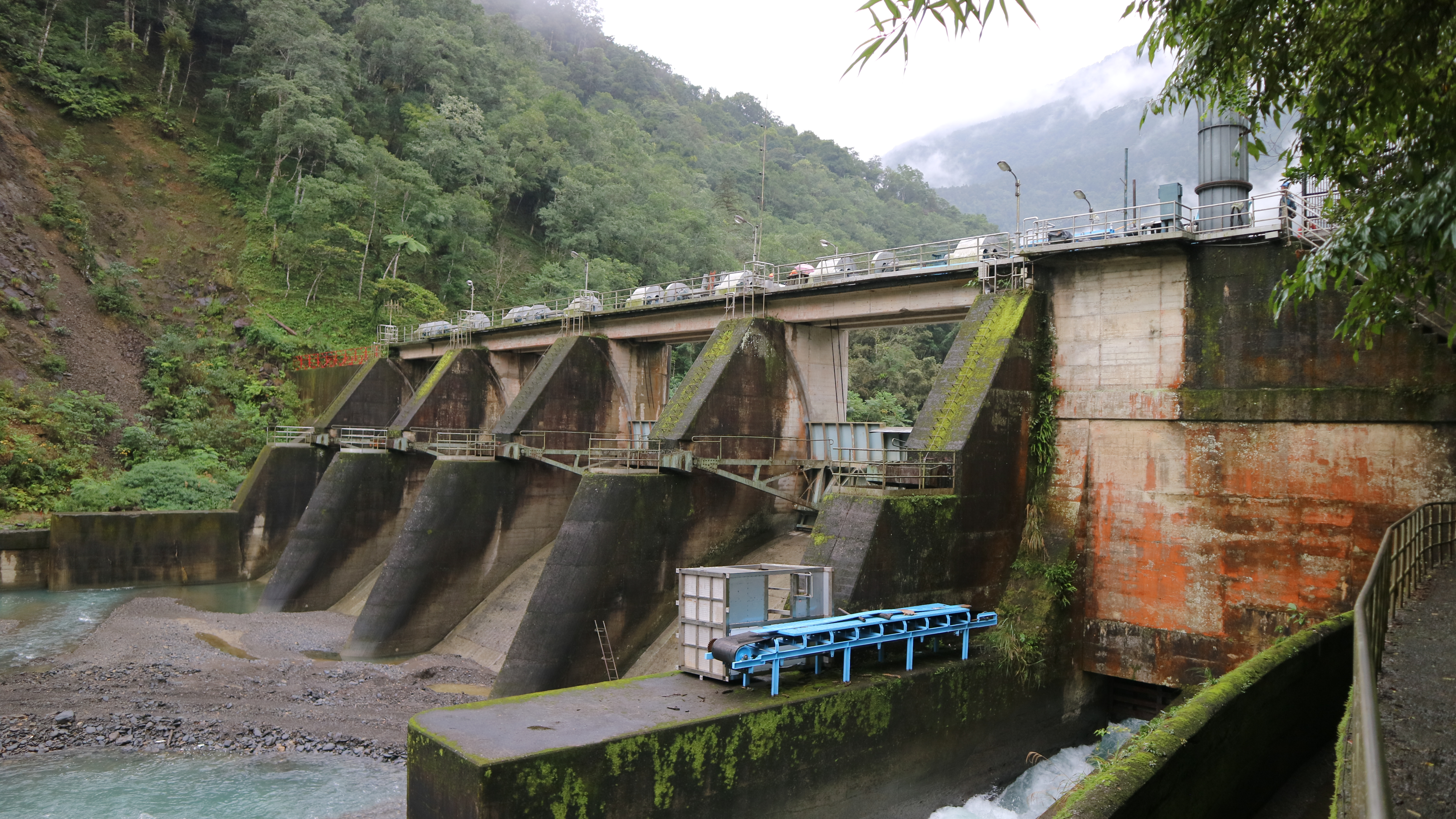 新北市烏來區臺灣電力公司桂山發電廠阿玉壩